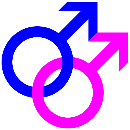 Interlinked male symbols